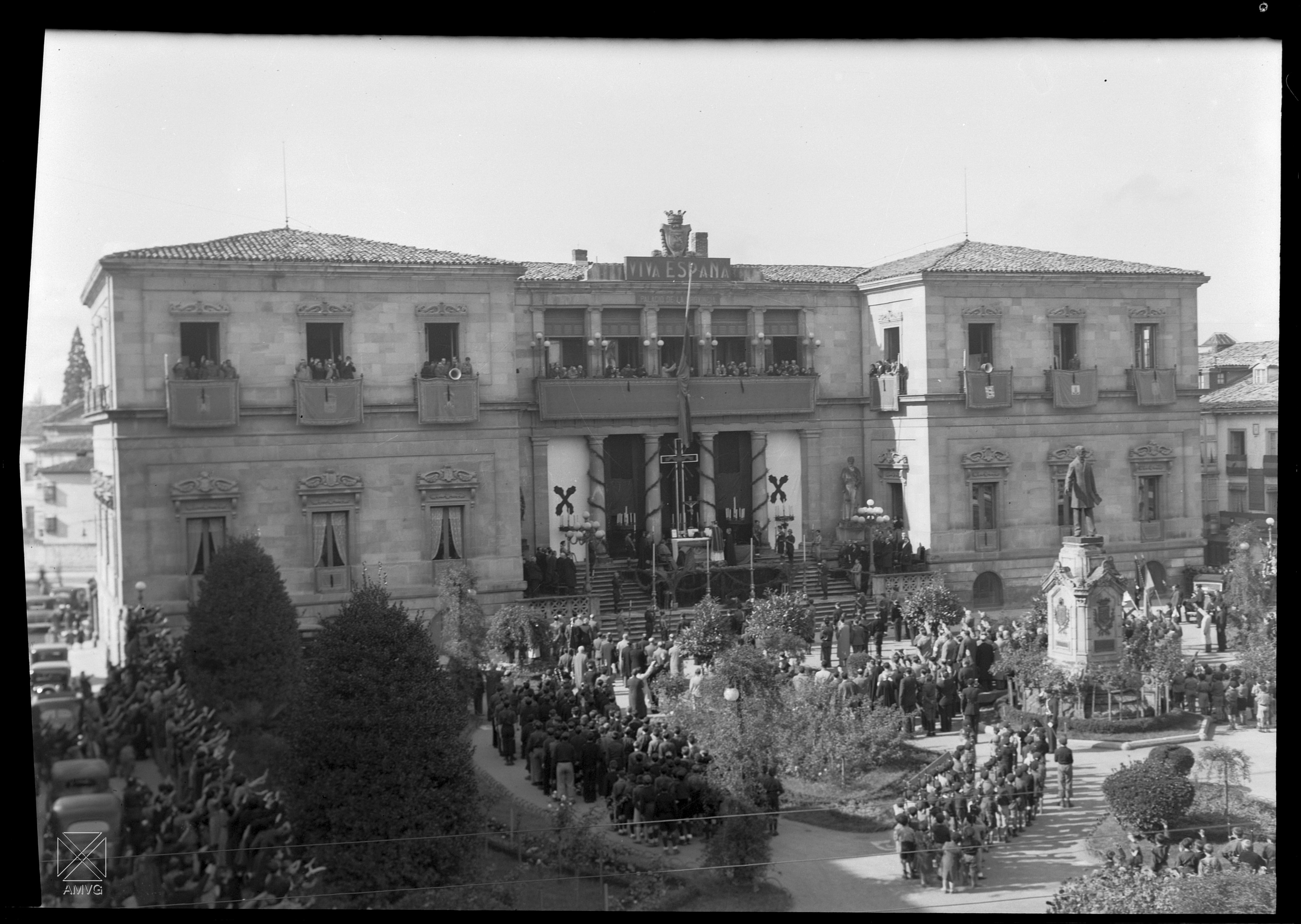 Celebración en la plaza de la Provincia como homenaje a los caídos en la guerra civil.